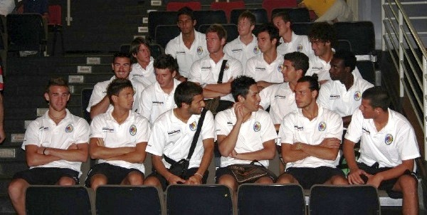 La rosa dell'ASD Santarcangelo 2009/10